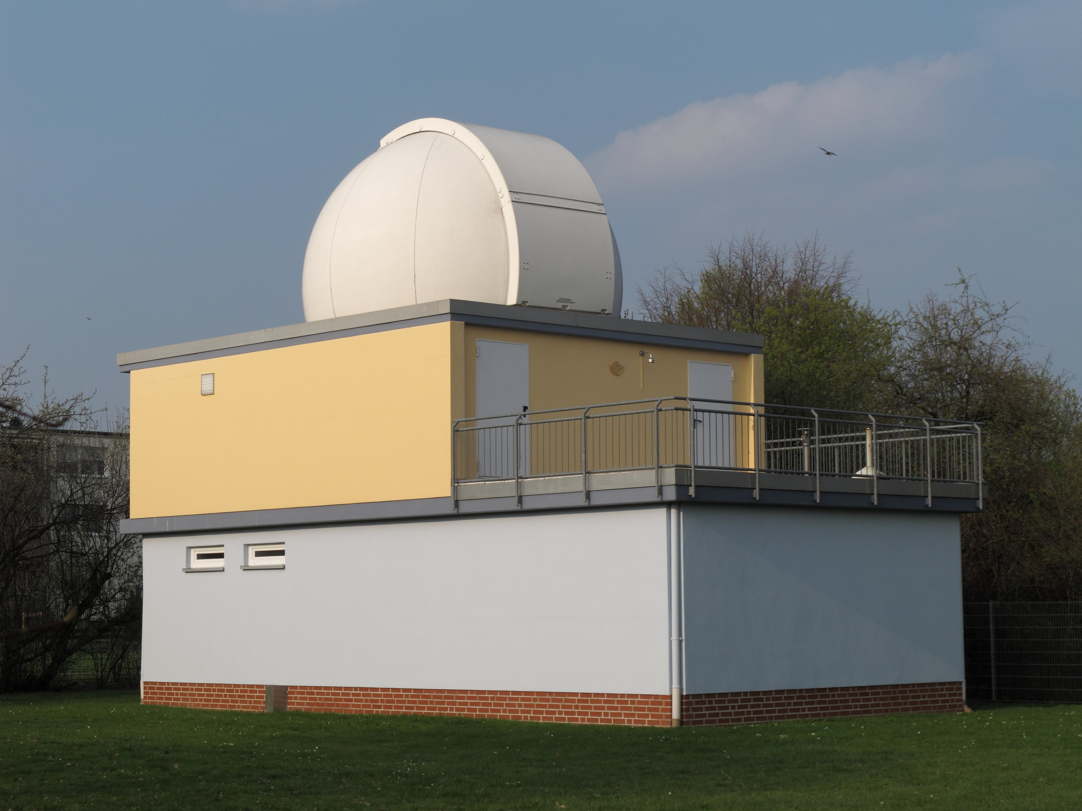 Braunschweig Hondelage, Sternwarte. Die Kuppel von 5,3 m Durchmesser beherbergt ein 500-mm-Telskop. Eröffnung: 2004.